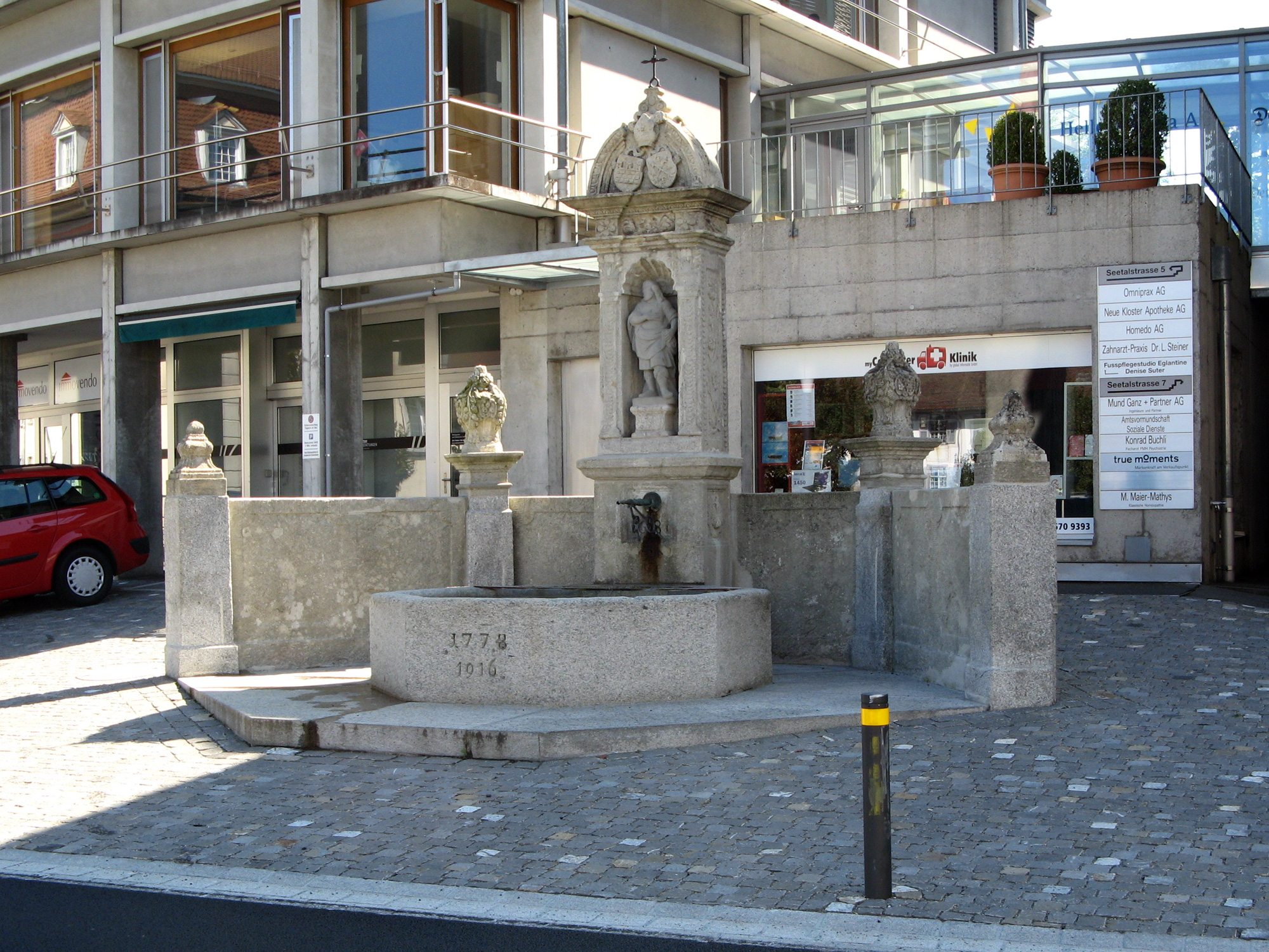 Leontiusbrunnen in Muri, an der Kreuzung Seetalstrasse / Marktstrasse / Kirchbühlstrasse (südwestlich des Klosters)